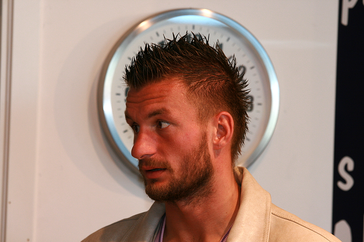 Kristian Nicht, Viking FK